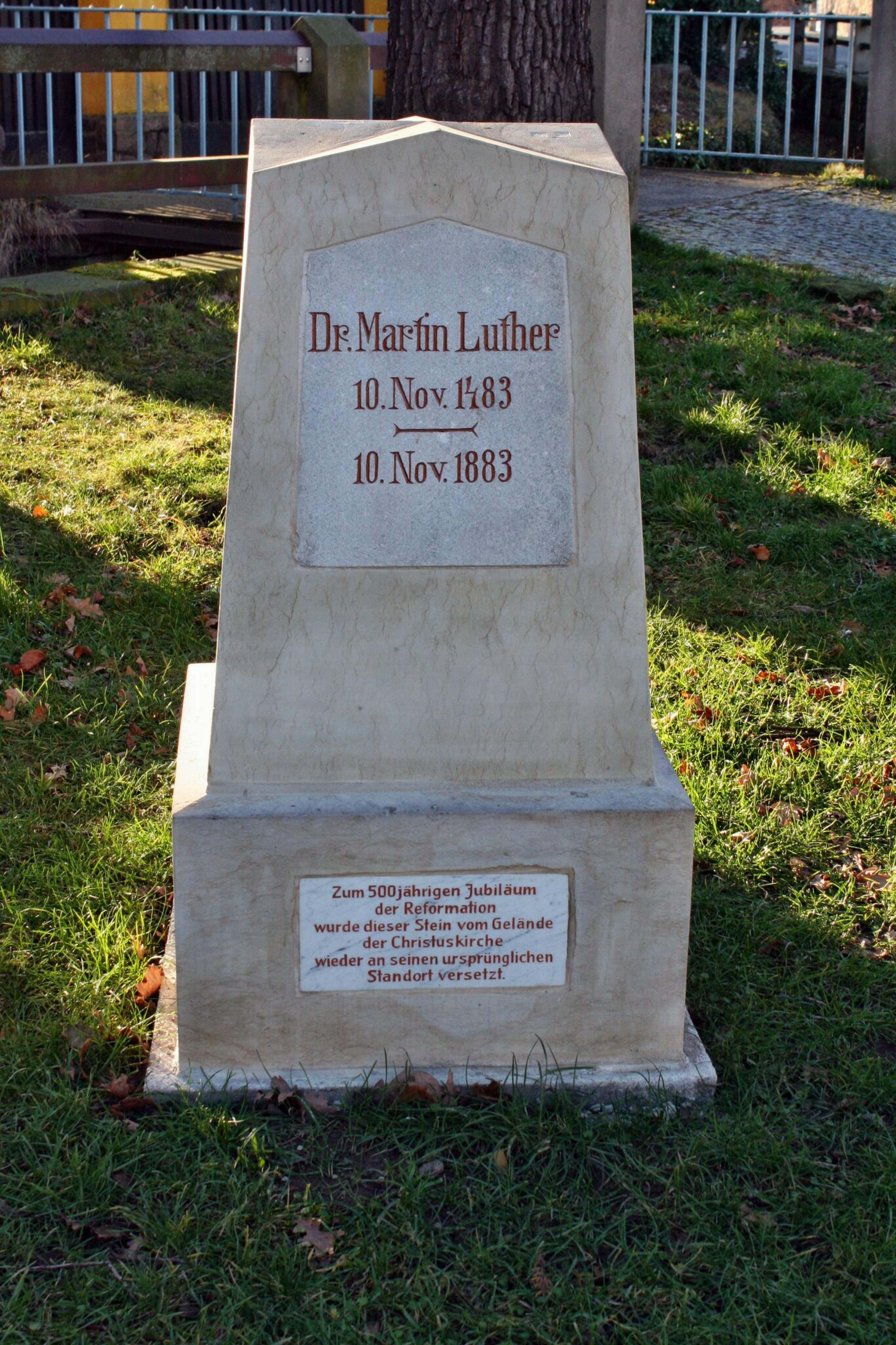 Heidenau: Luthersäule und Luthereiche wurden im Jahr 1910 aufgestellt beziehungsweise gepflanzt. Im Jahr 2017 erfolgte eine Sanierung des Gedenksteines.